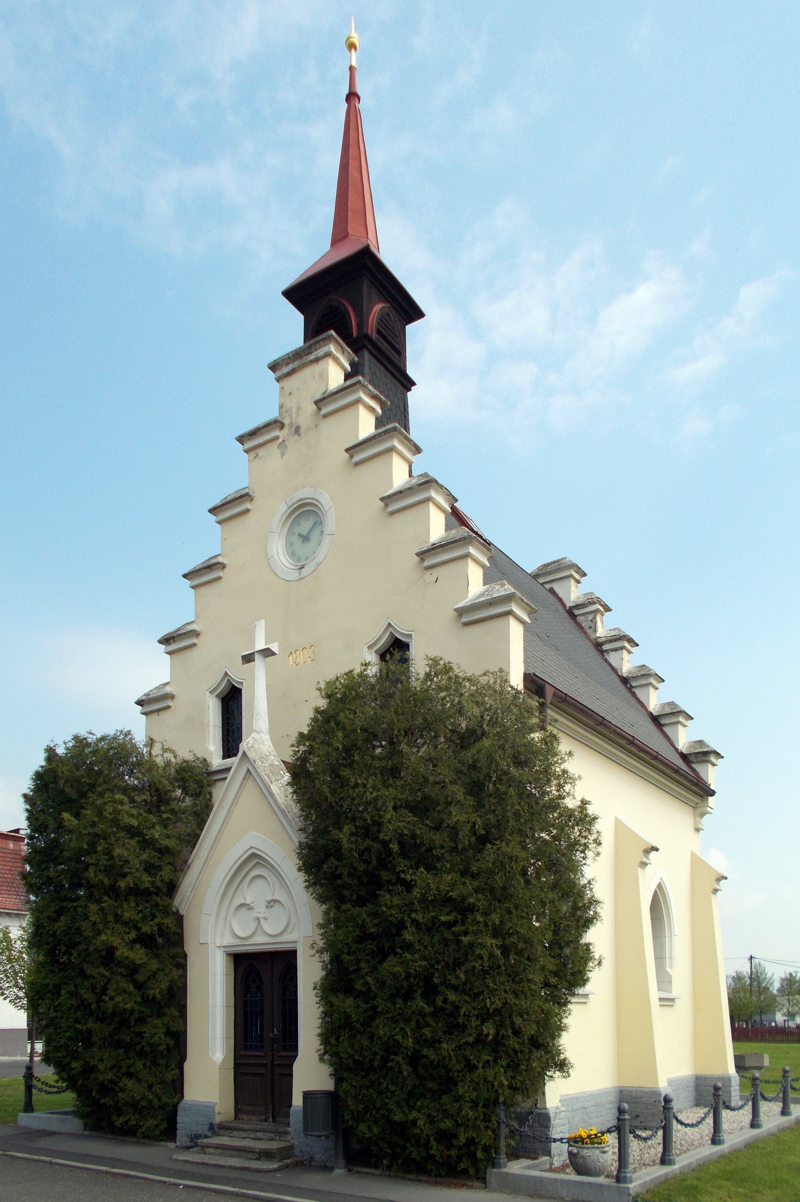 Kirche von Srbická in Teplice/Tschechien